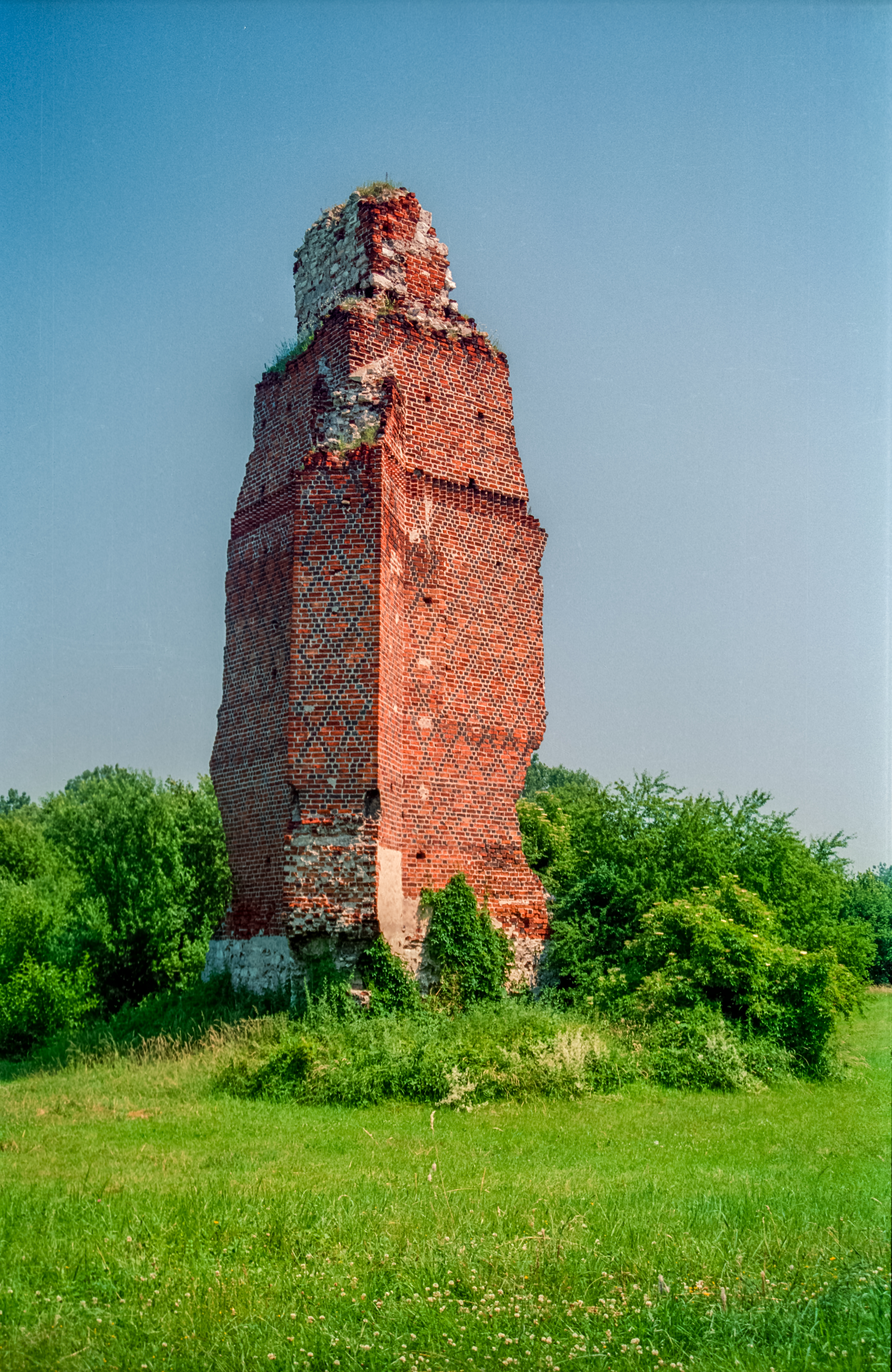 Rytwiany - ruiny zamku, 1 poł. XV w